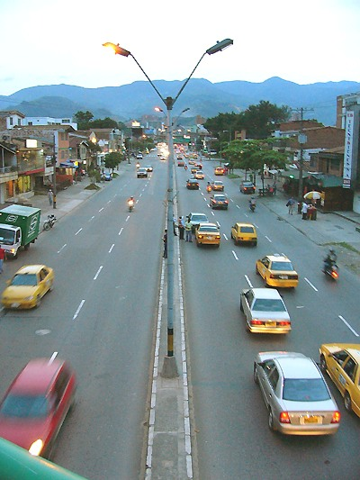 Avenuo. Foto farita, en 2006/06/23, de Luis Guillermo Restrepo Rivas, kiun la aŭtoro liveras por publika kaj libera uzado far iu ajn homo aŭ maŝino.